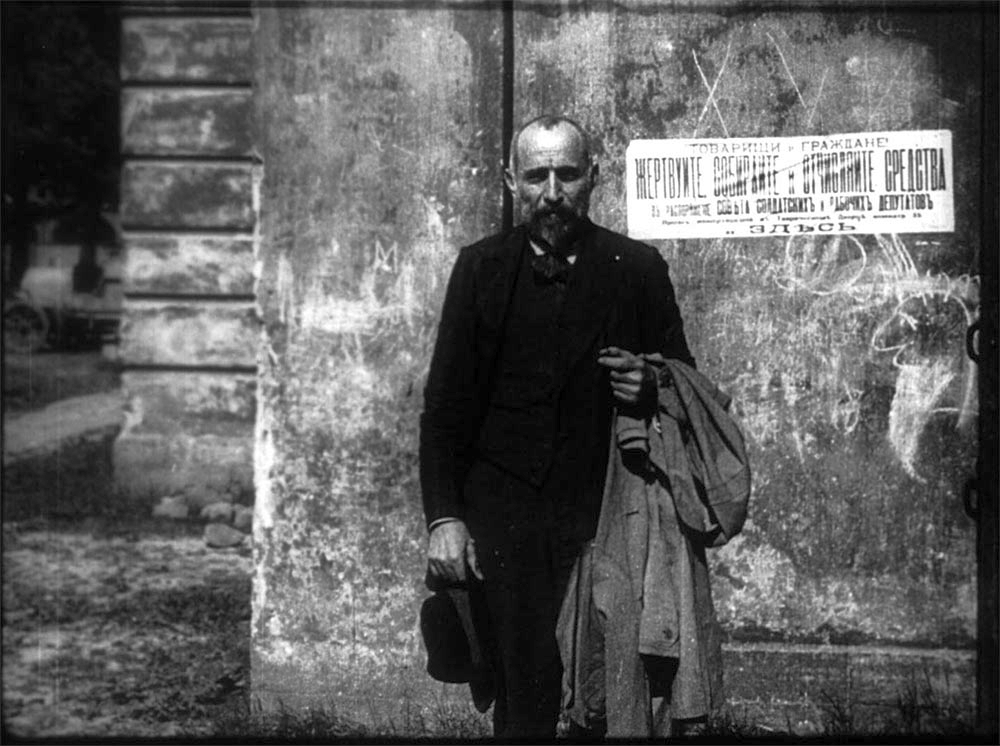 Николай Семёнович Чхеидзе - председатель I Всероссийского съезда Советов рабочих и солдатских депутатов